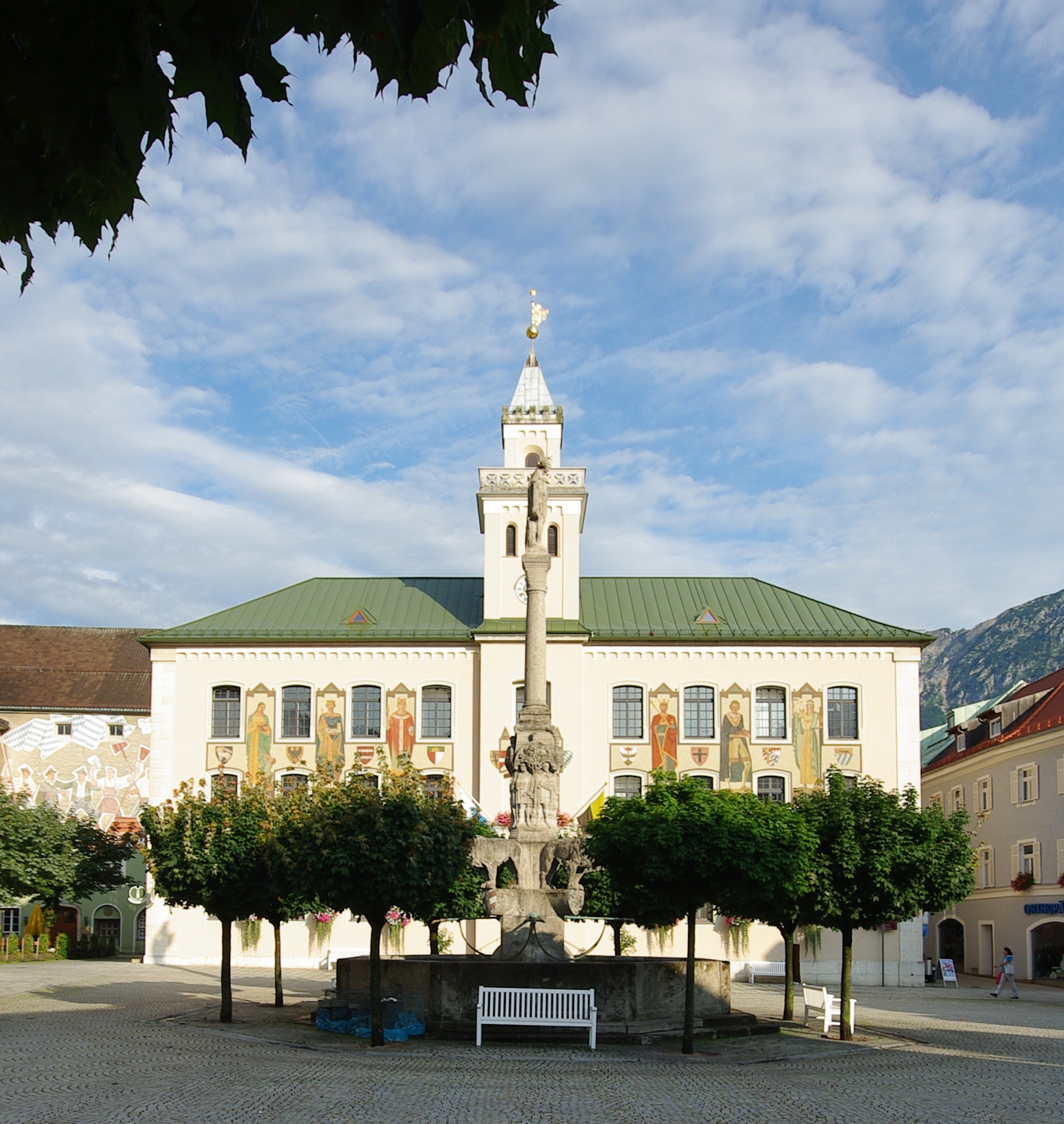 Rathausplatz 1, 83435 Bad ReichenhallThis is a photograph of an architectural monument.